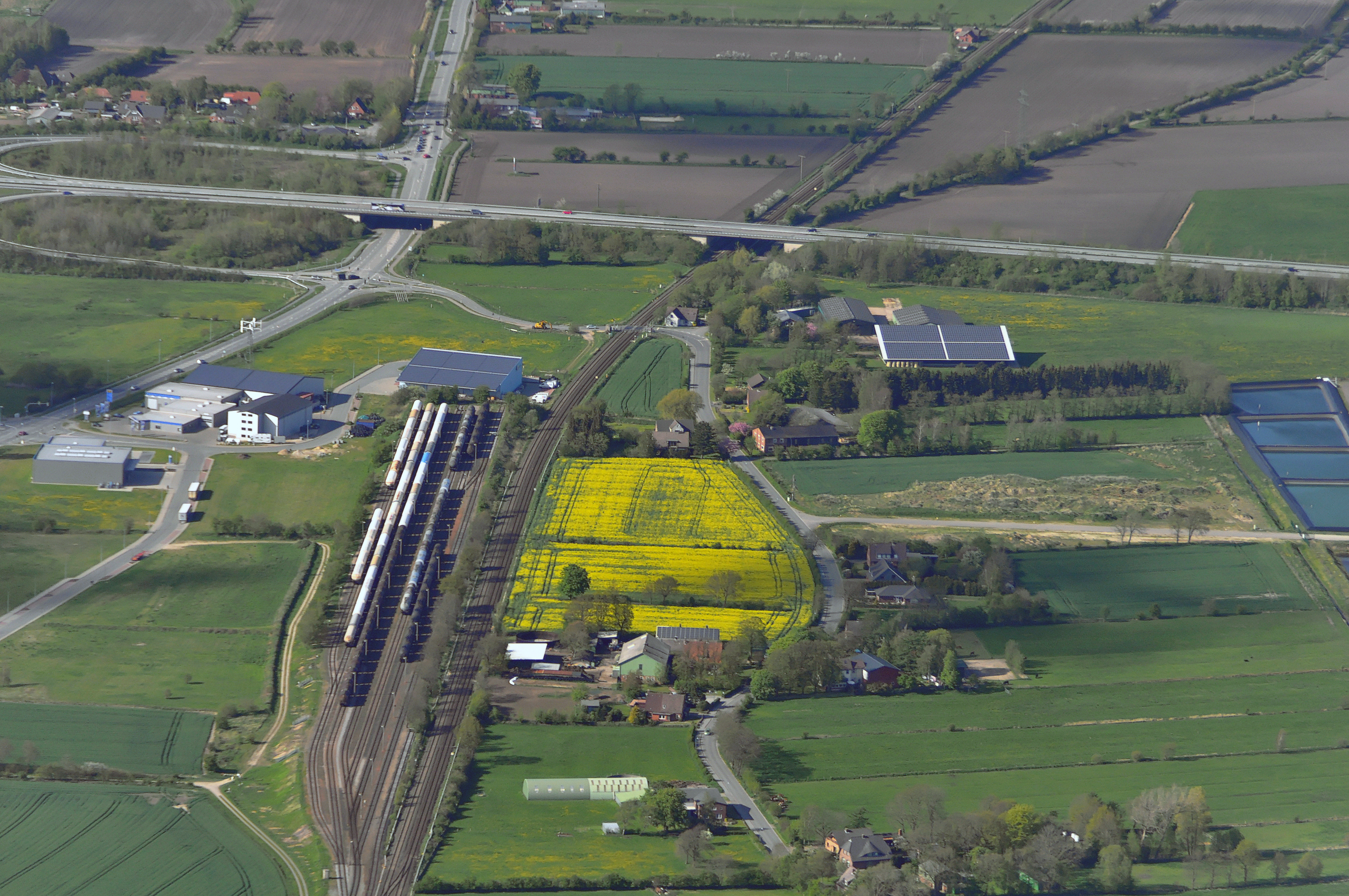 Die Marschbahn auf Höhe der Rangieranlage der Erdölraffinerie Hemmingstedt